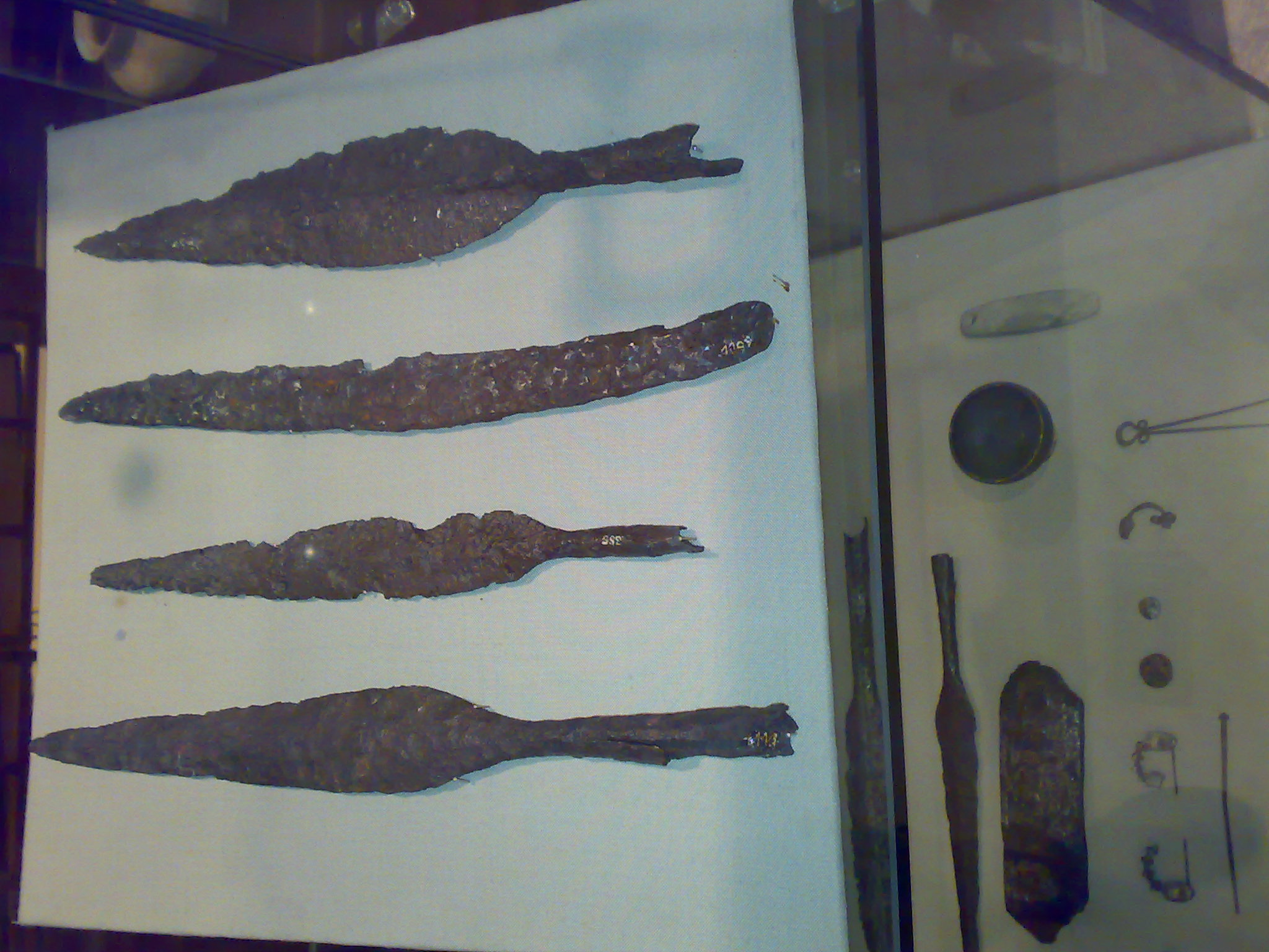 Bronze Age implements, Nat Hist Museum, Cetinje, Montenegro